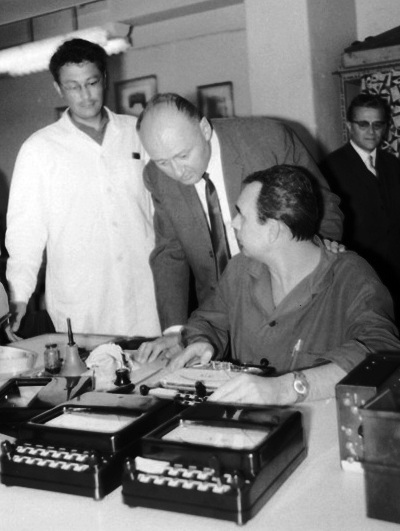 Biszku Béla a Ganz Műszer Művekben